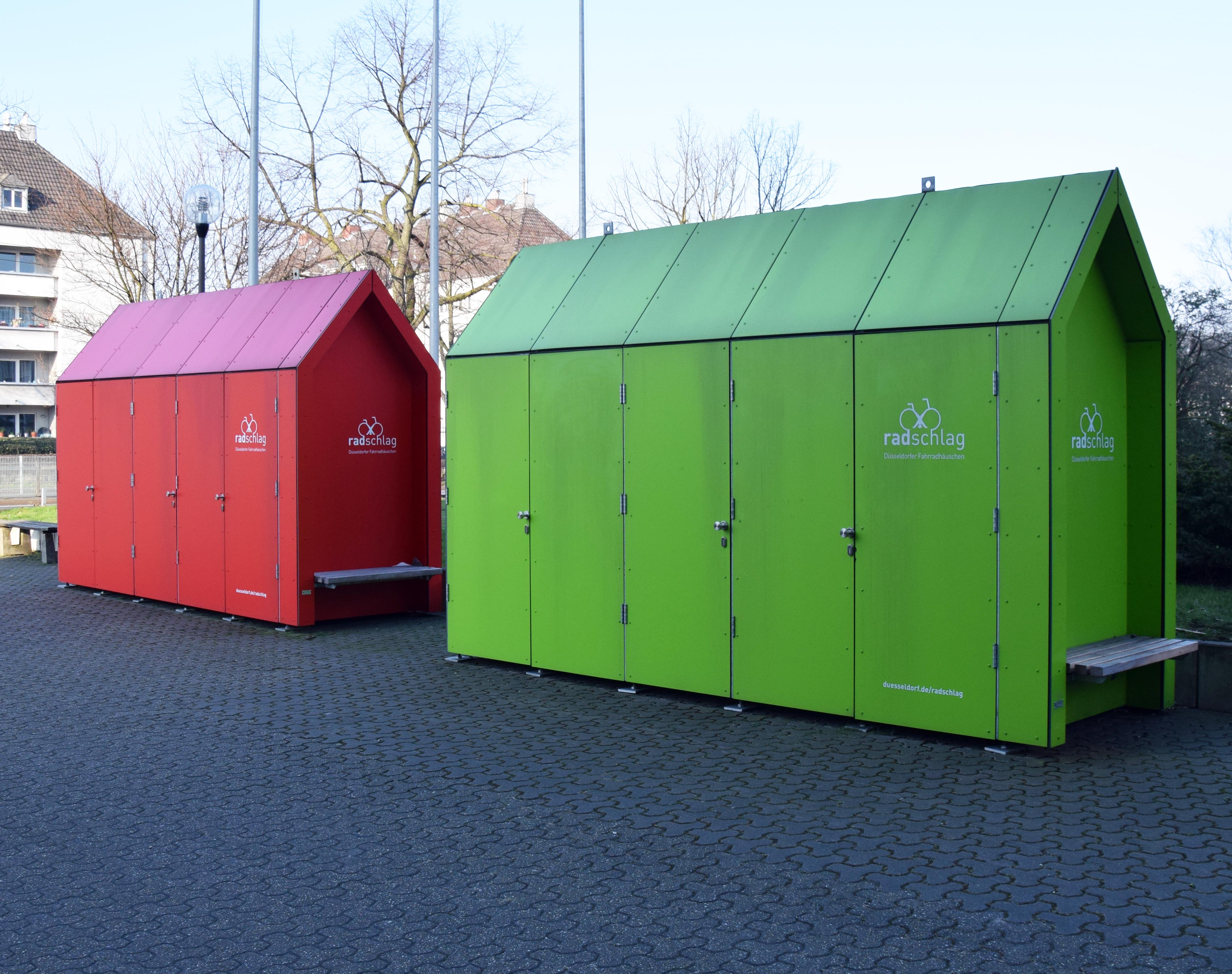 Das Düsseldorfer Fahrradhäuschen wurde vom Architekturbüro Atelier Fritschi + Stahl entworfen.